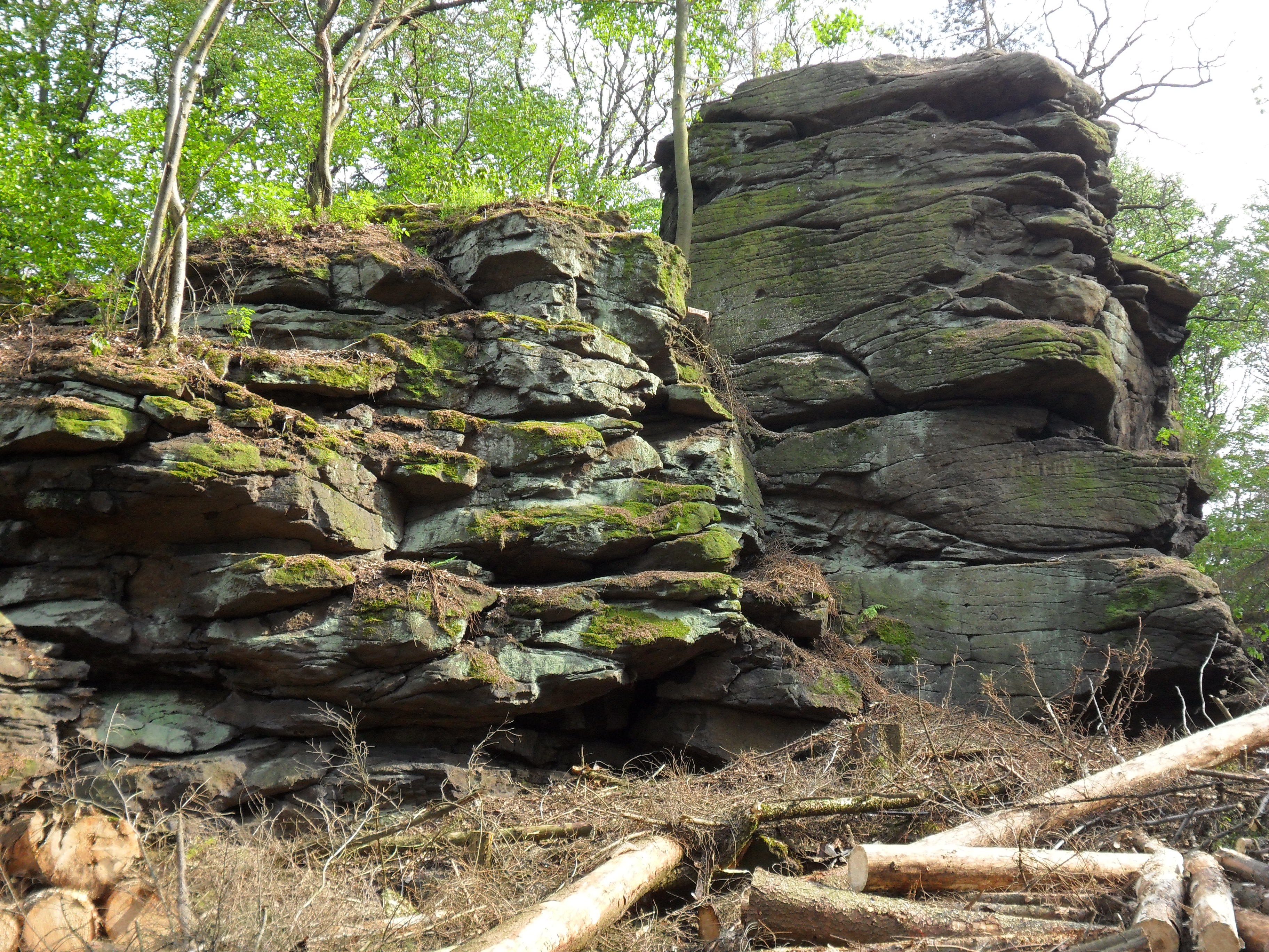 Felsformation direkt auf dem Gipfel, mit zirka 10 m Höhe